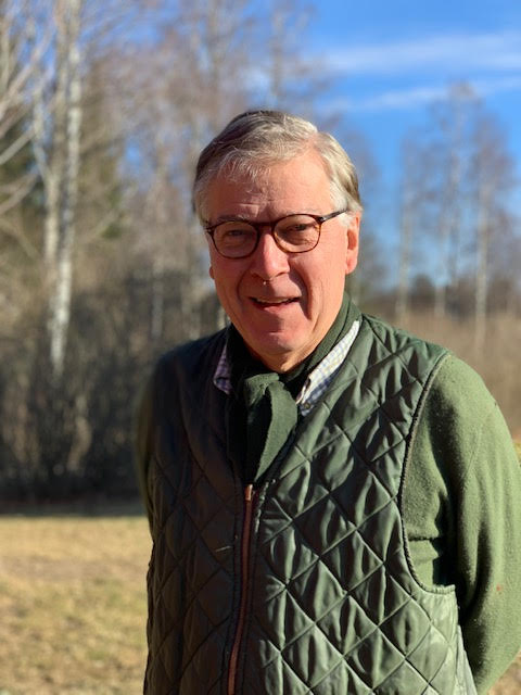 Johan Stenberg fotograferad på Ändebol gård i Sörmland